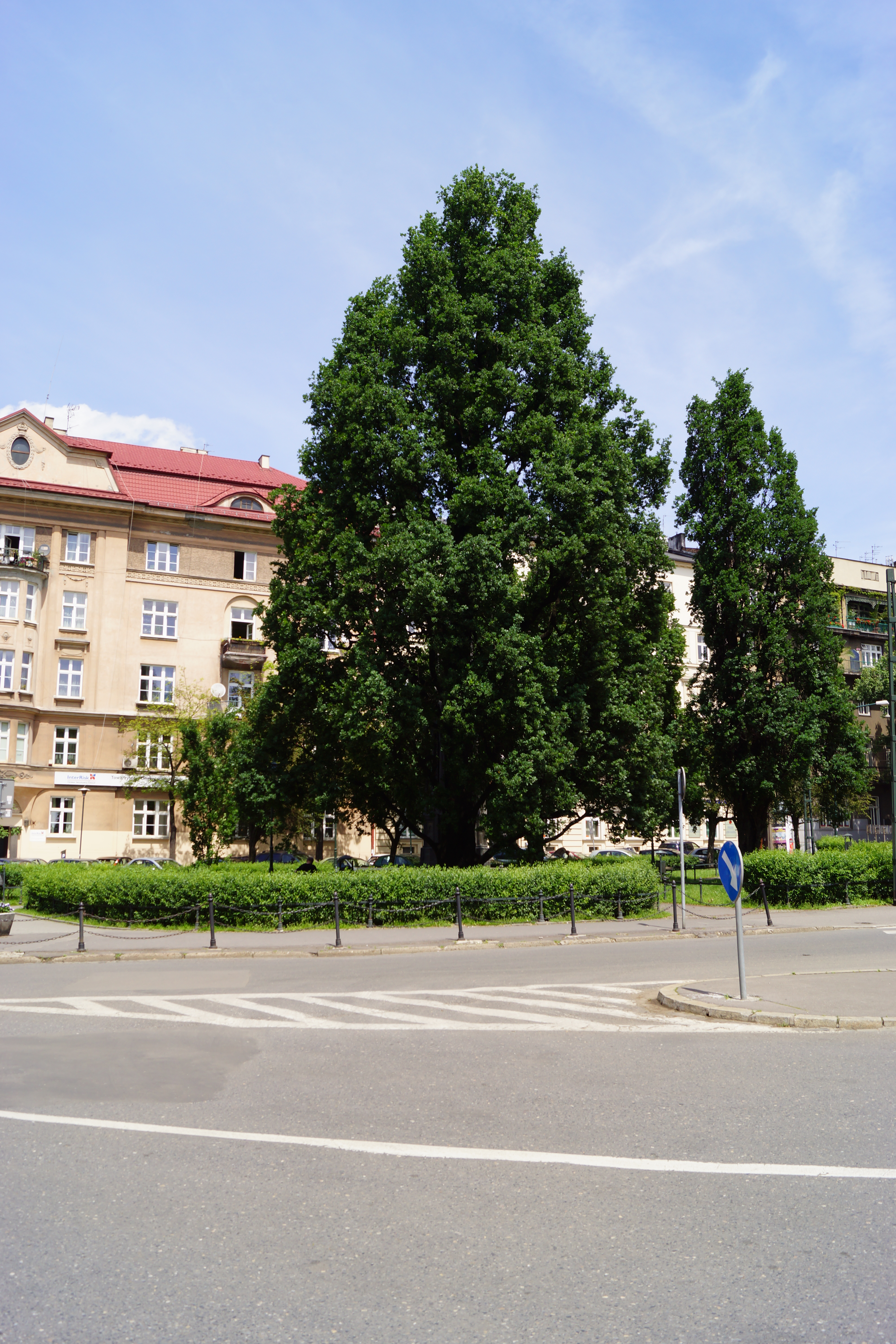 Qercus robur „Fastigiata” dąb szypułkowy odm. kolumnowa This photograph shows a natural monument of Poland registered under number XXXI/406/07 (list)